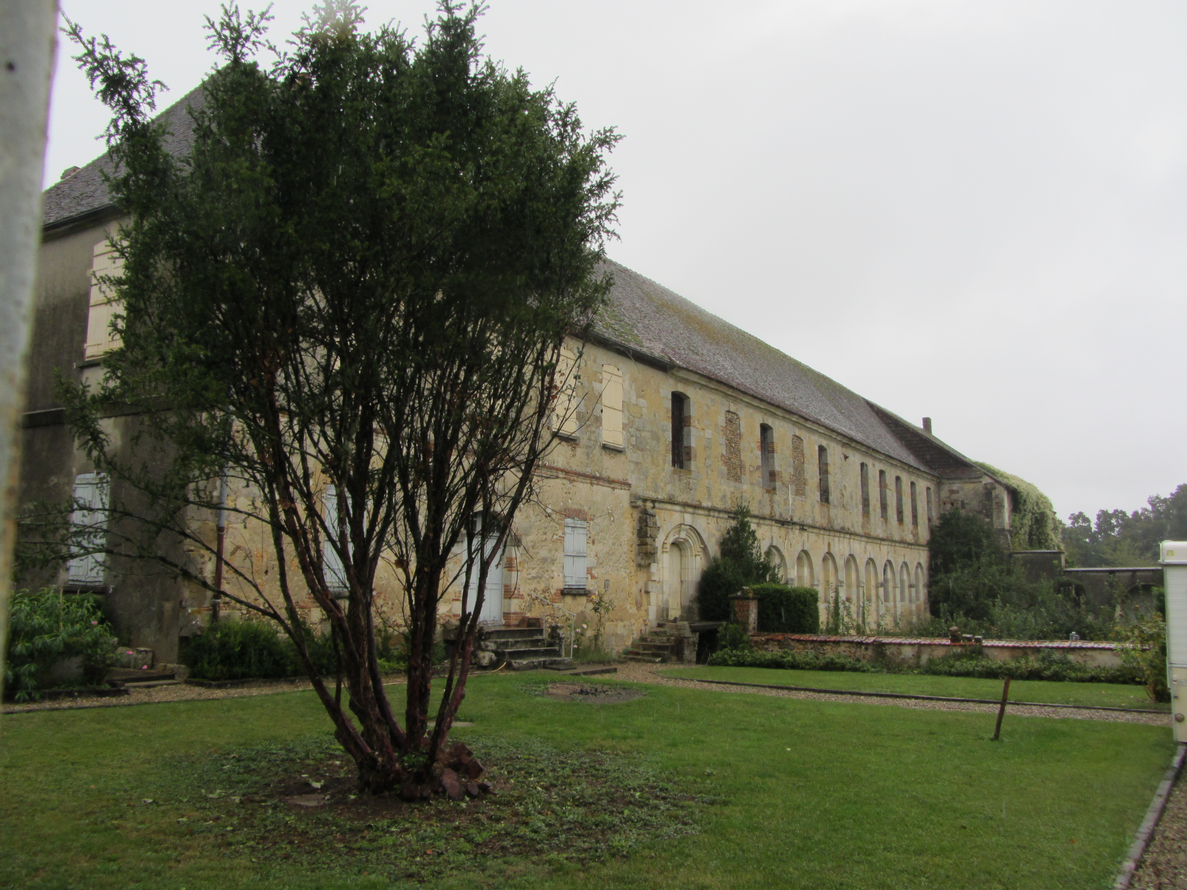 La maison conventuelle de l'abbaye des Echarlis de lordre de Citeaux fondée en1108 à Villefranche-Saint-Phal (Yonne)